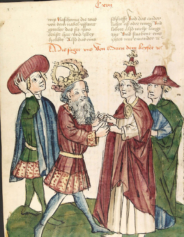 Kaiser Otto d. I. begegnet Papst Johannes XII. Werkstatt des Diebold Lauber, unbekannter Künstler, um 1450 Zeichnung (ganzseitig), ungerahmt, Feder & koloriert, Wasserfarbe & Deckfarbe Kaiser Otto I. läuft mit offenen Armen auf Papst Johannes XII. zu, der ihn ebenso empfängt. Hinter dem Kaiser steht ein Höfling, der sich an den Hut greift, hinter dem Papst ein Kardinal.